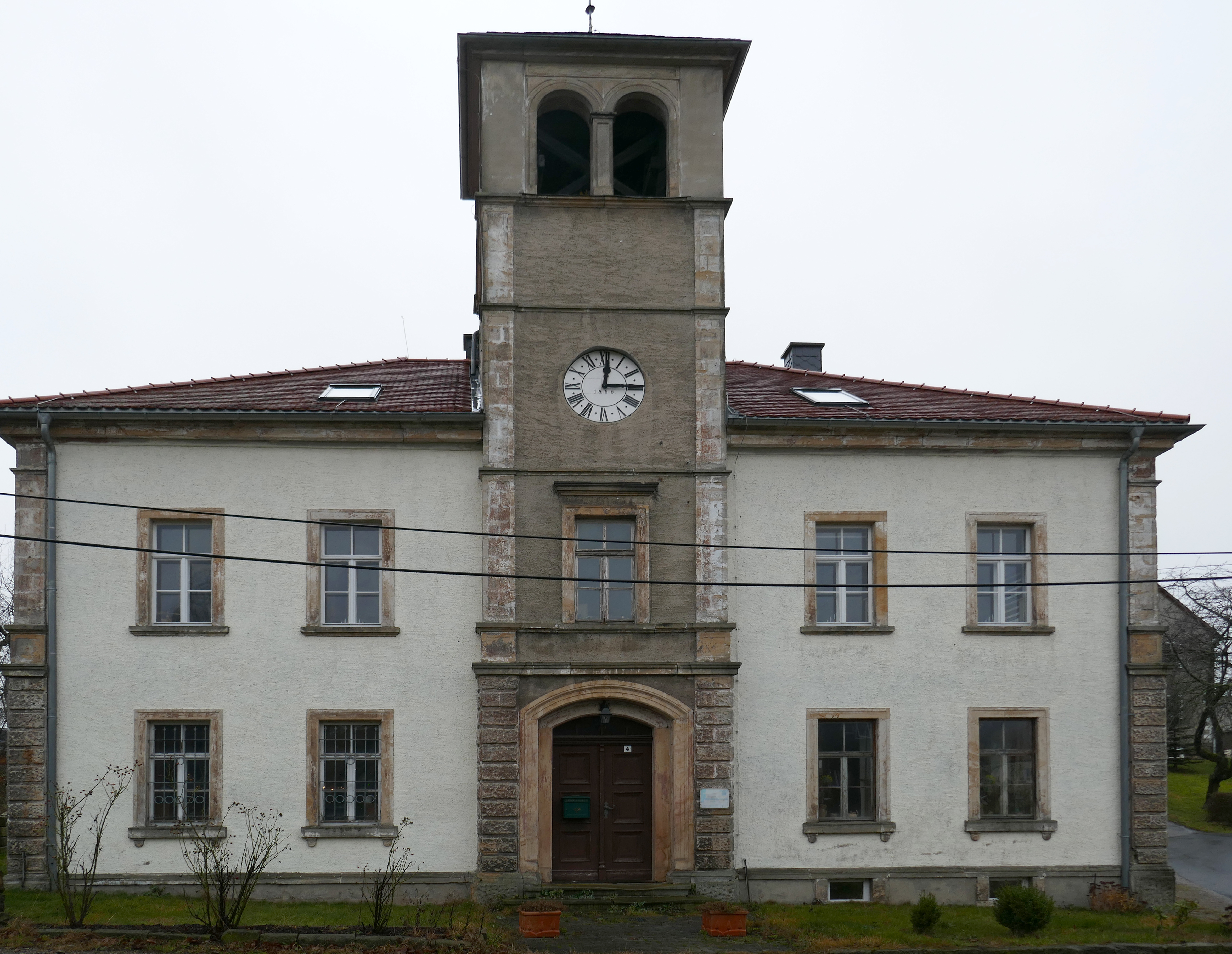 Alte Schule, Bergstraße 4, Röthenbach (Klingenberg), Landkreis Sächsische Schweiz-Osterzgebirge - Sachsen.